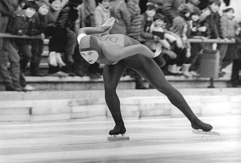 Andrea Schöne ADN-ZB Kluge 17.2.1985 Karl-Marx-Stadt: Eisschnelllauf - Sieg für Andrea Schöne.- Bei den DDR-Eisschnelllaufmeisterschaften der Frauen auf Einzelstrecken bewältigte die Mehrkampfmeisterin Andrea Schöne vom SC Einheit Dresden die 1000-m-Distanz in sehr guten 1:24,02 Min. (Foto von früherem Wettkampf)